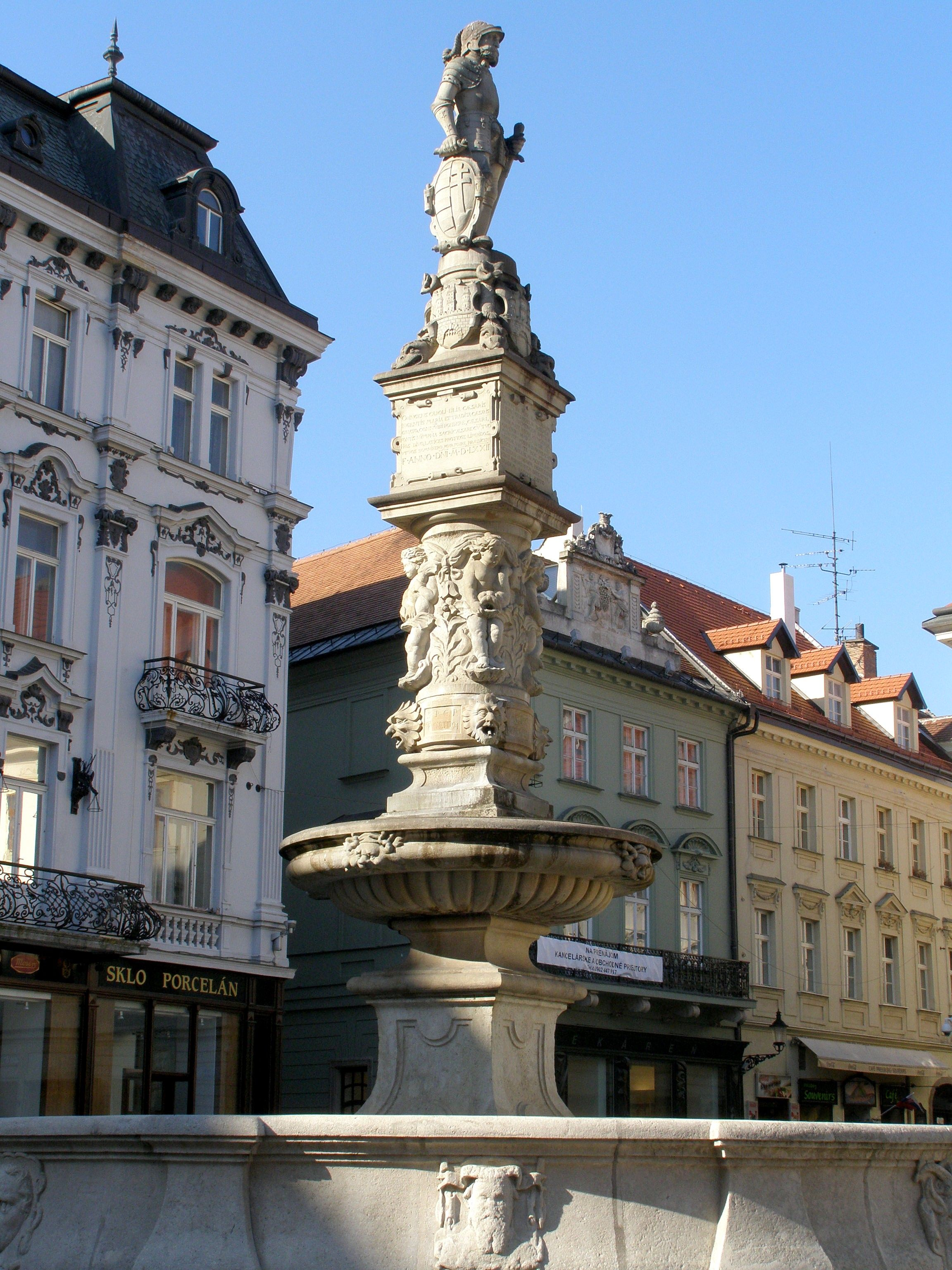 Celkový pohľad na Maximiliánovu fontánu, zdobiacu Hlavné námestie v Bratislave